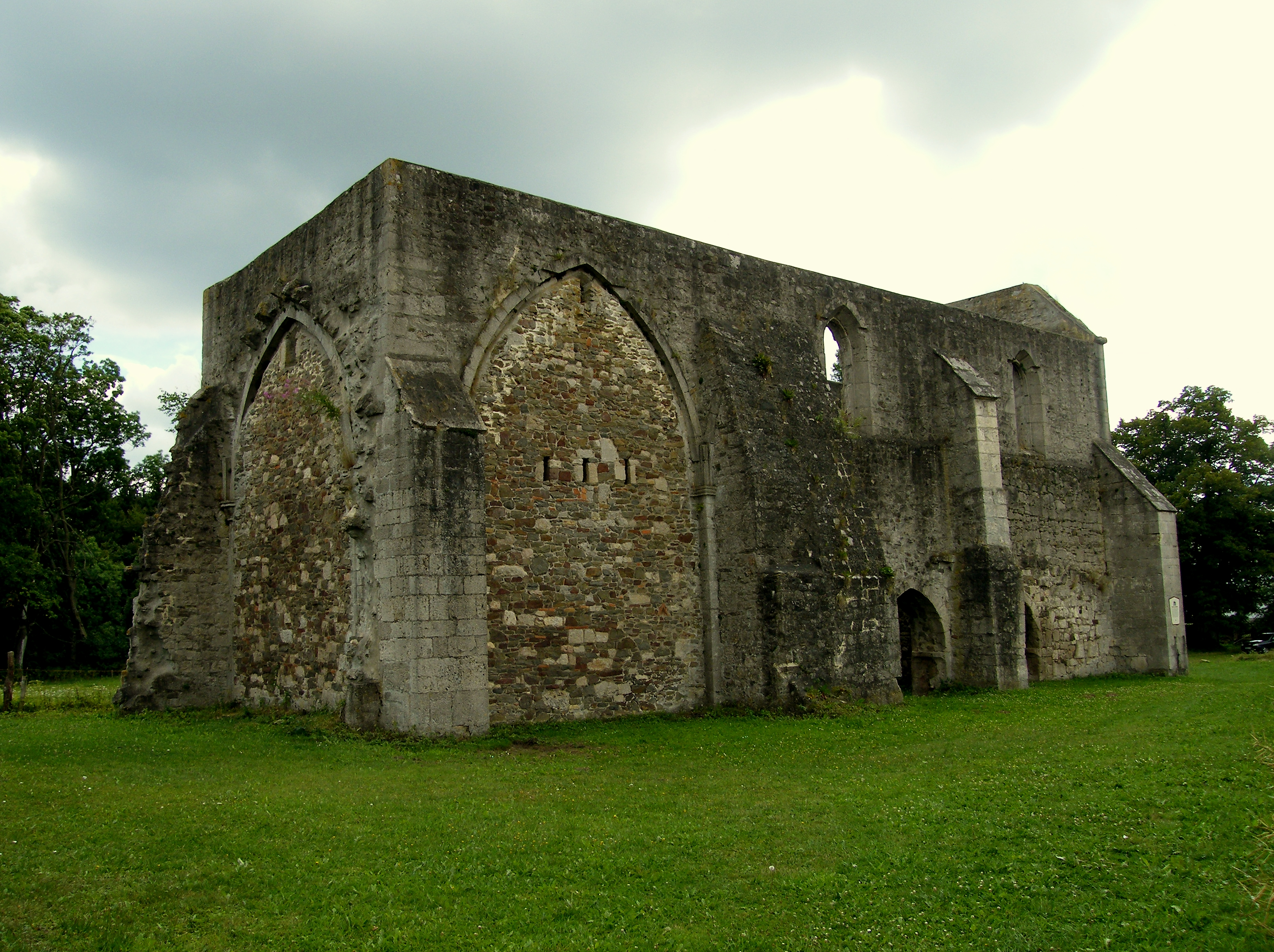 Benediktinerinnen Kloster Schaaken Gesamtansicht gegründet um 1200